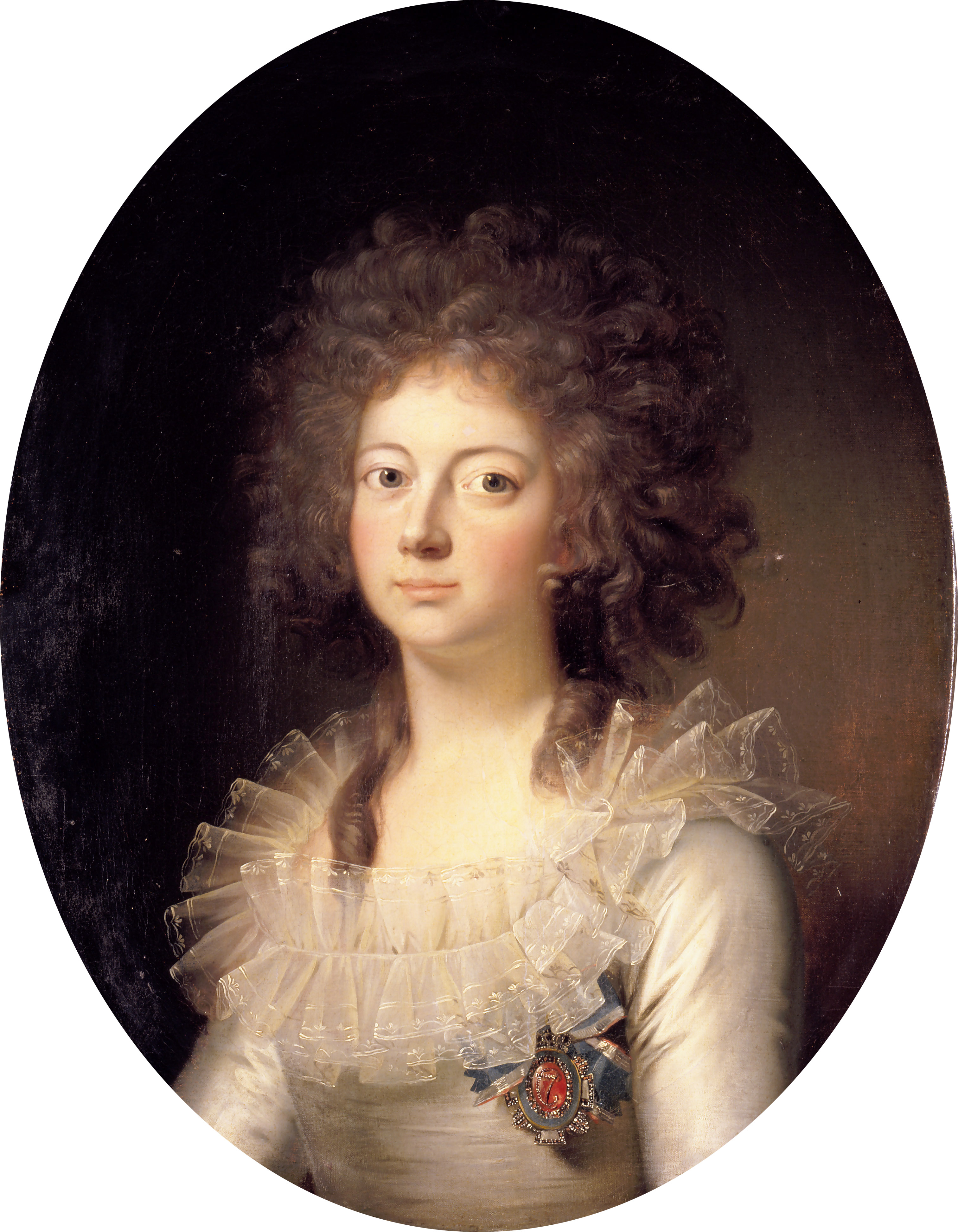 Portrait of Marie Sophie of Hesse-Cassel (1767-1852)label QS:Len,"Portrait of Marie Sophie of Hesse-Cassel (1767-1852)"label QS:Lfr,"Portrait de Marie Sophie de Hesse-Cassel"